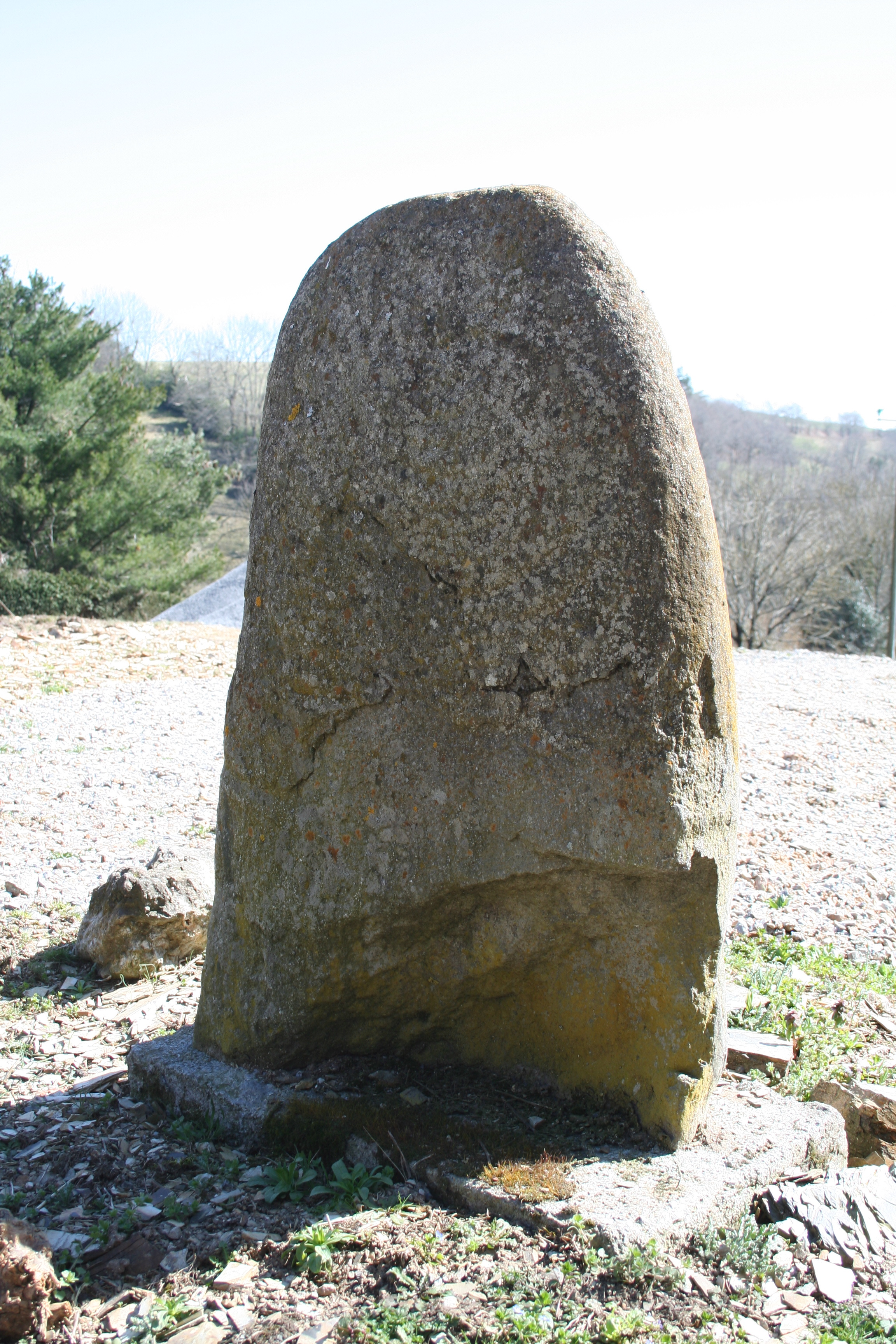 Moulin-Mage (Tarn) - statue-menhir (2) de Rieuviel (arrière).